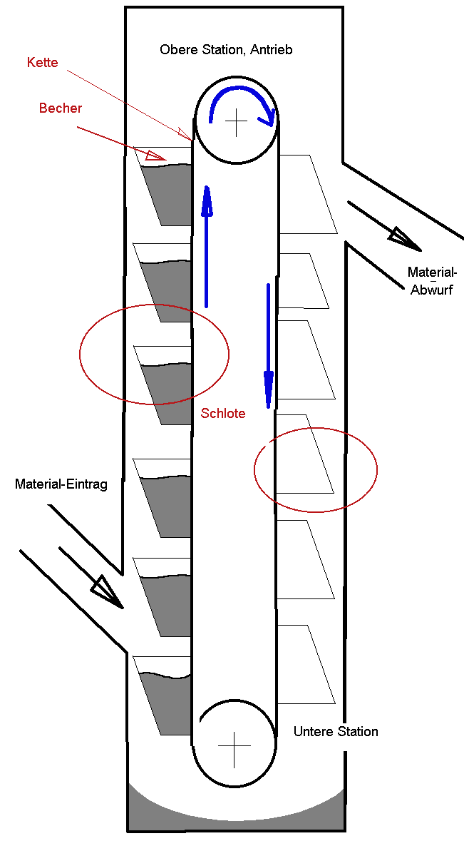 Becherwerk (Prinzip)